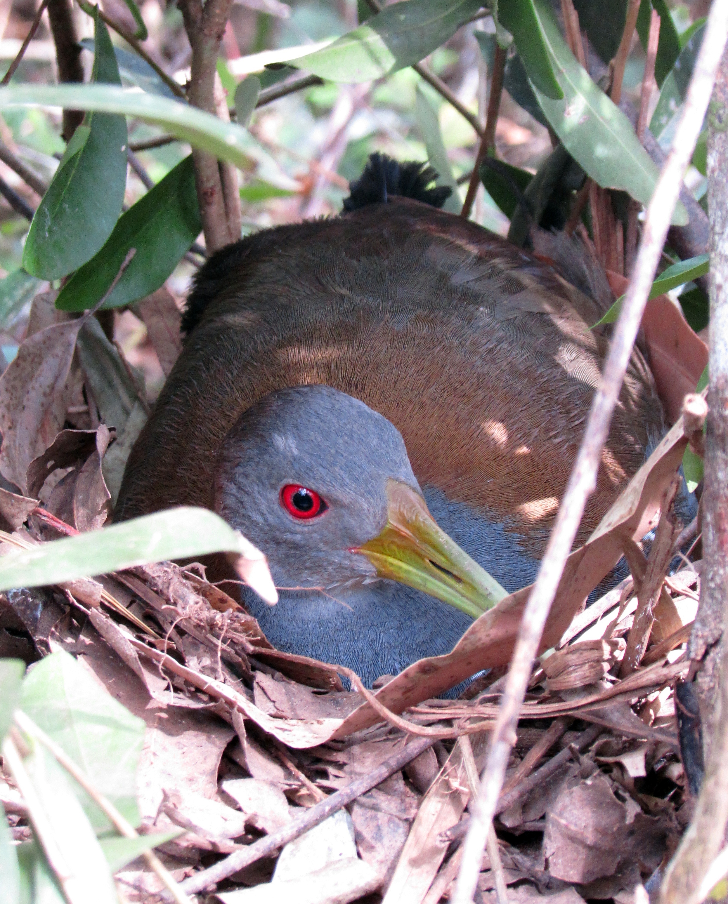 Saracura-do-mato protegendo seu ninho.